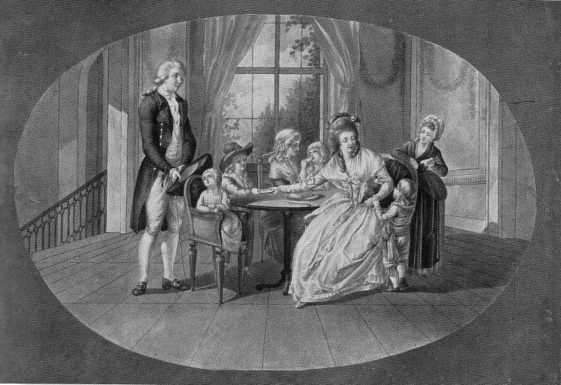 Werther y Lotte. Acuarela de Donat